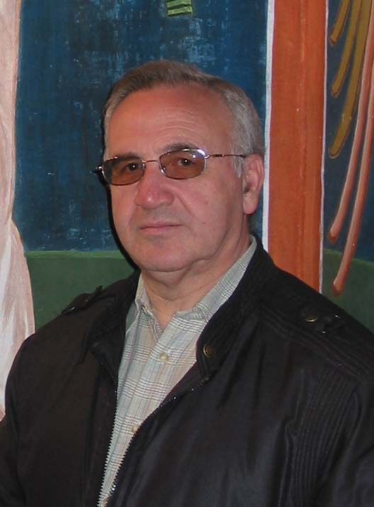 Fr Marcello Alfio Buscemi OFM